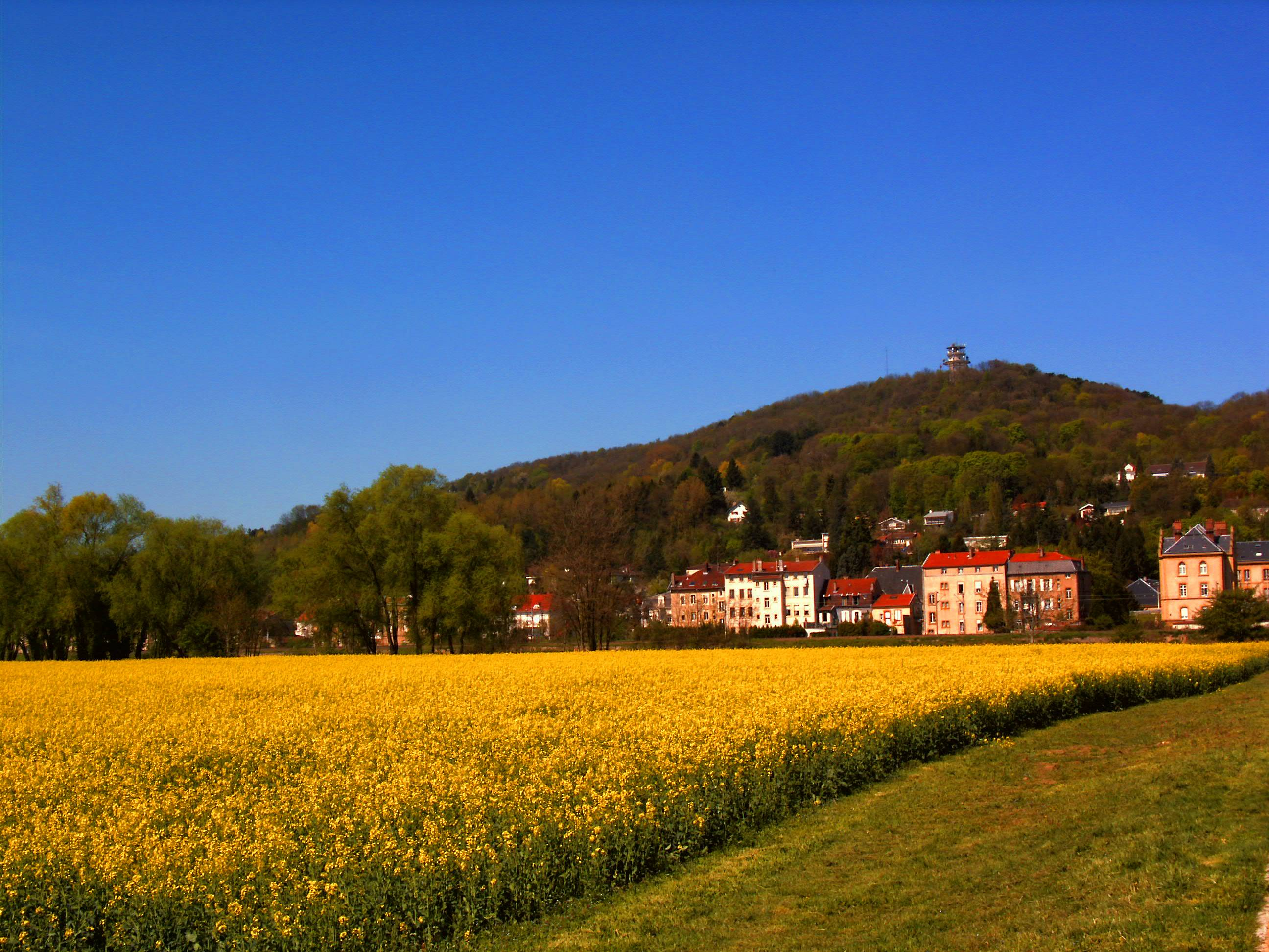 Champ de colza sur la rive de la Moselle. Au fond: la ville de Ban-Saint-Martin et le Mont-Saint-Quentin.